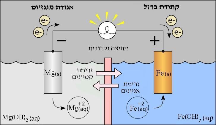 סכימה של תא אלקטרוכימי המורכב מחצי תא ברזל וחצי תא מגנזיום